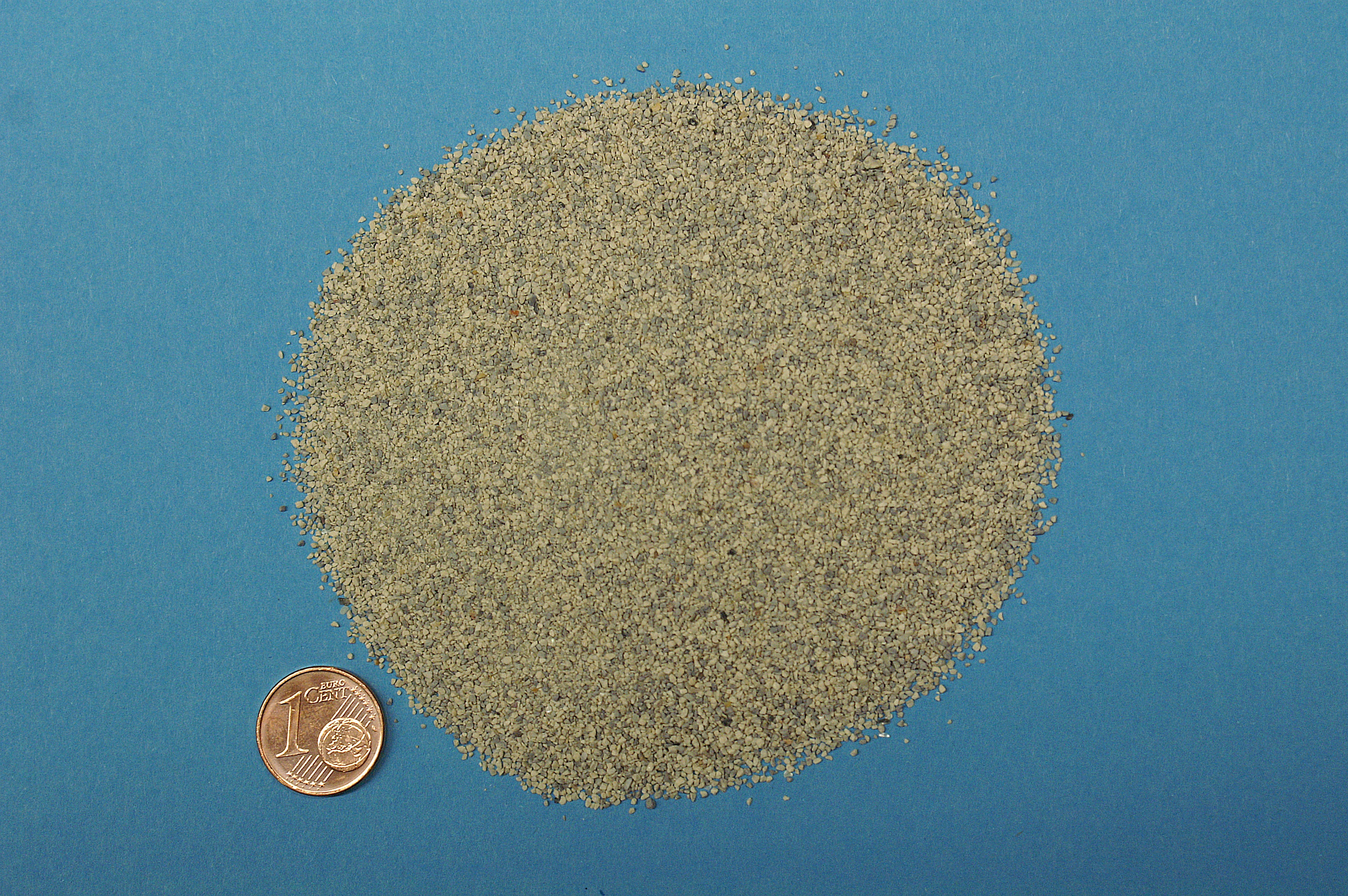 Meeresalgenkalk mit 82 % CaCO3 und 11 % MgCO3